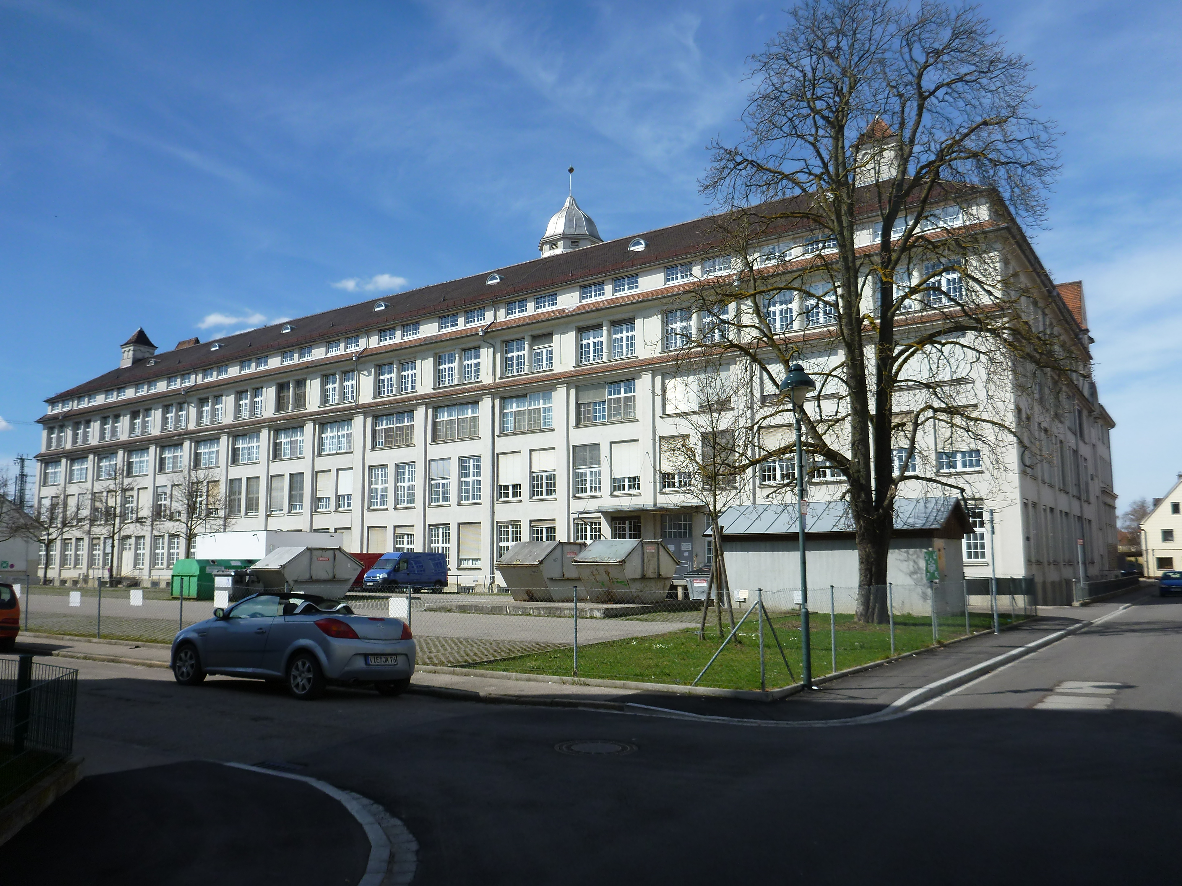 Südansicht der Fabrik, Baudenkmal